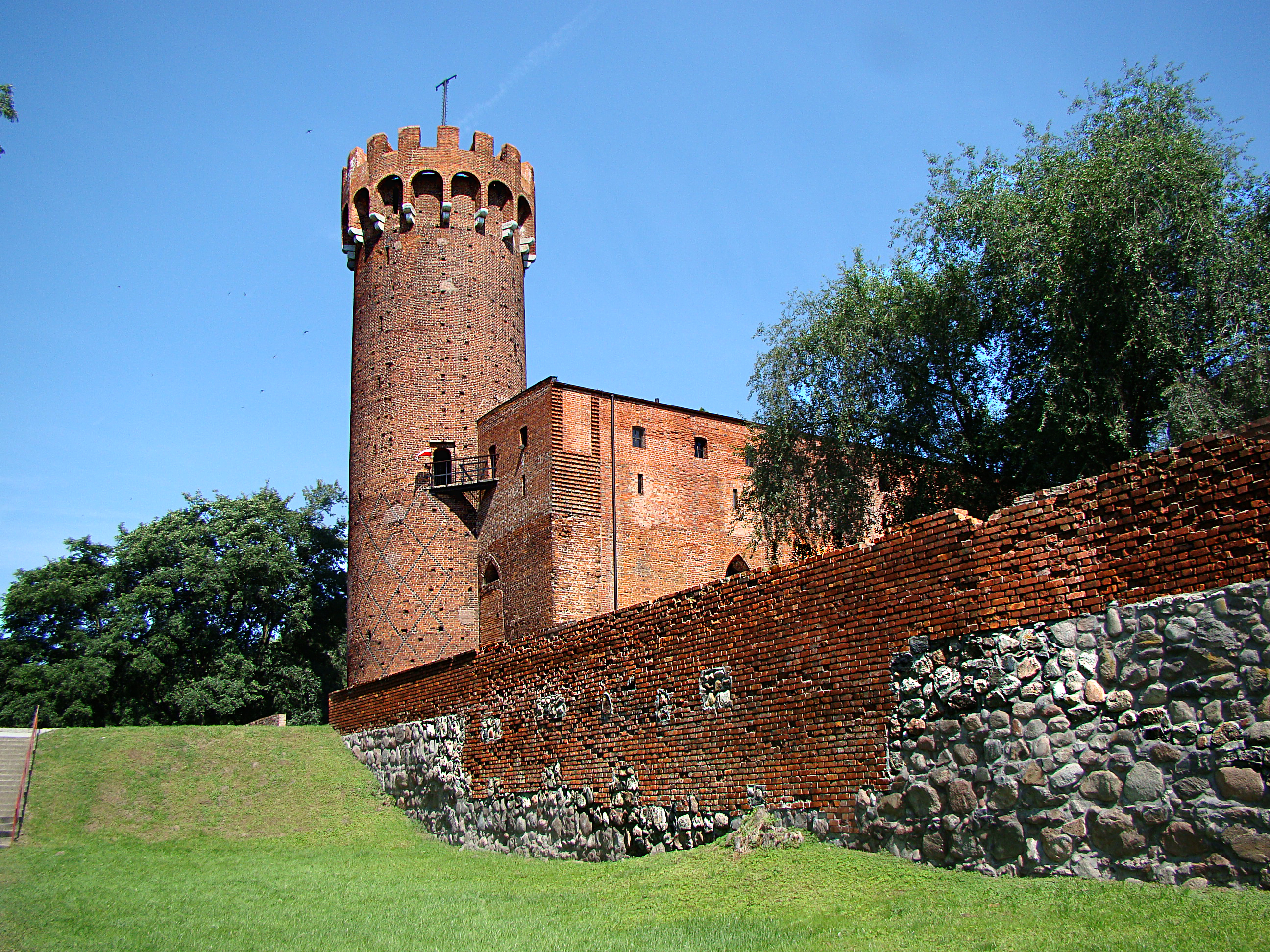 Ruiny zamku krzyżackiego w Świeciu nad Wisła, z przełomu XIV i XV w.